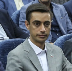 مهدی حاجتی در مراسم تحلیف اعضای پنجمین دوره شورای اسلامی شهر شیراز